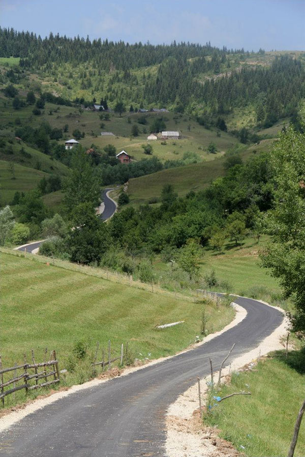 Башча, Рожаје